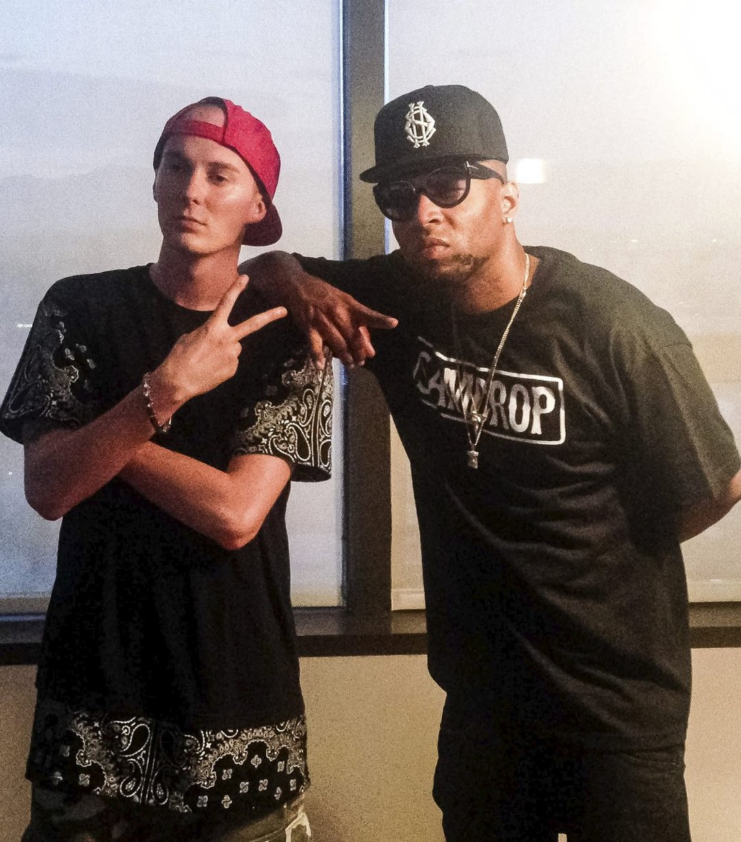 Mads Veslelia og Drumma Boy (2015)